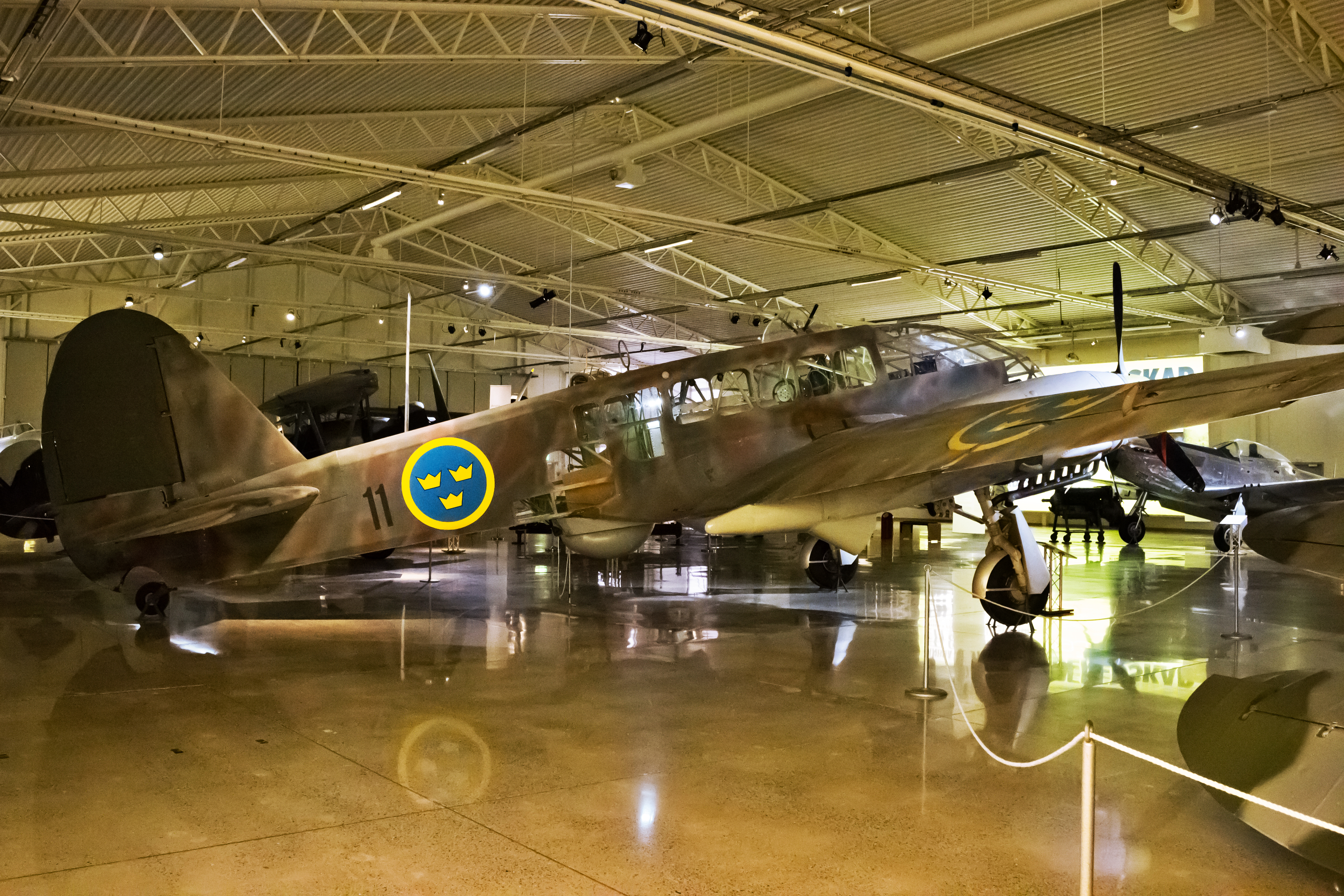 Caproni Ca.313 no museo da Forza Aérea Sueca, Flygvapenmuseum, en Linköping.